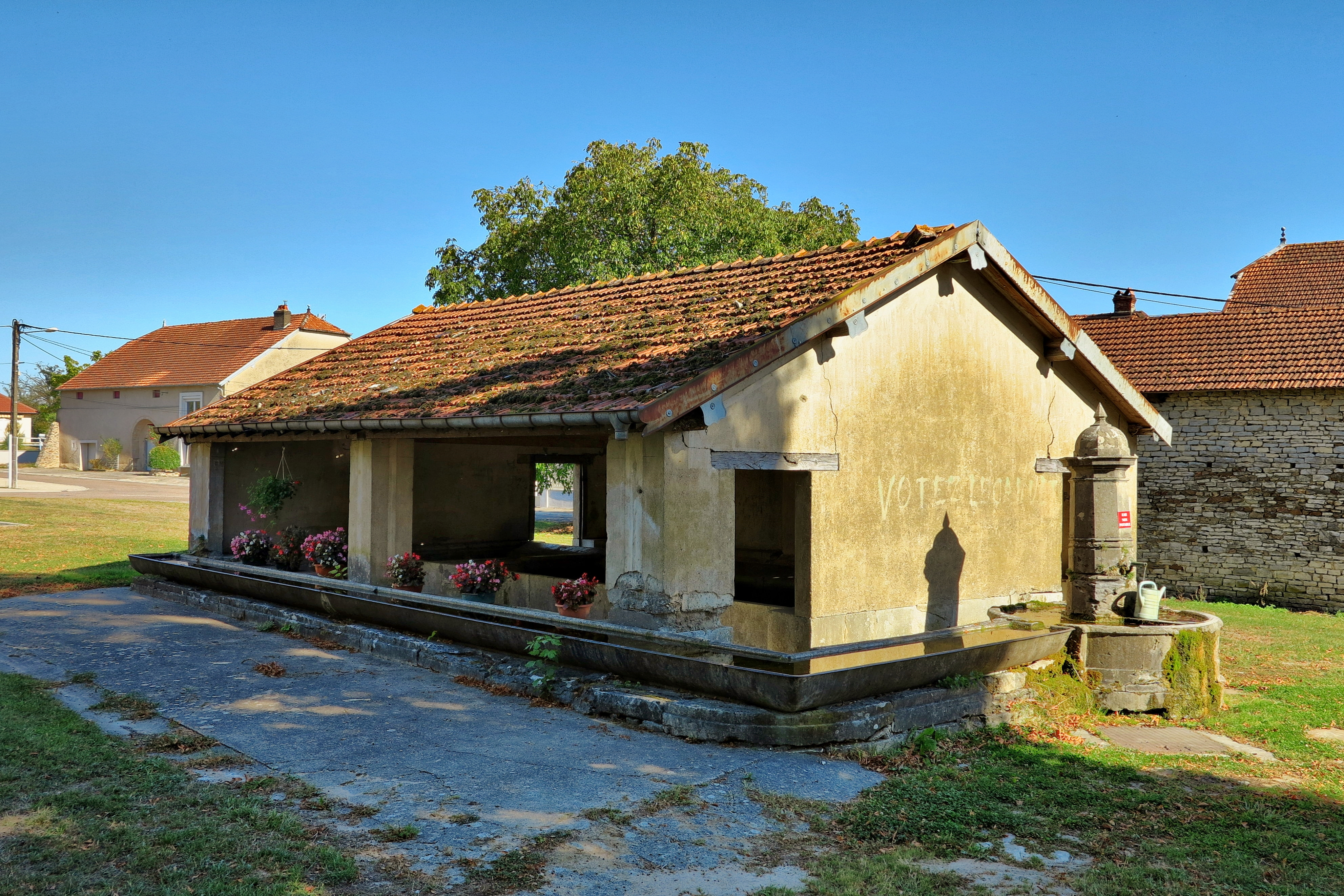 La fontaine-lavoir-abreuvoir .